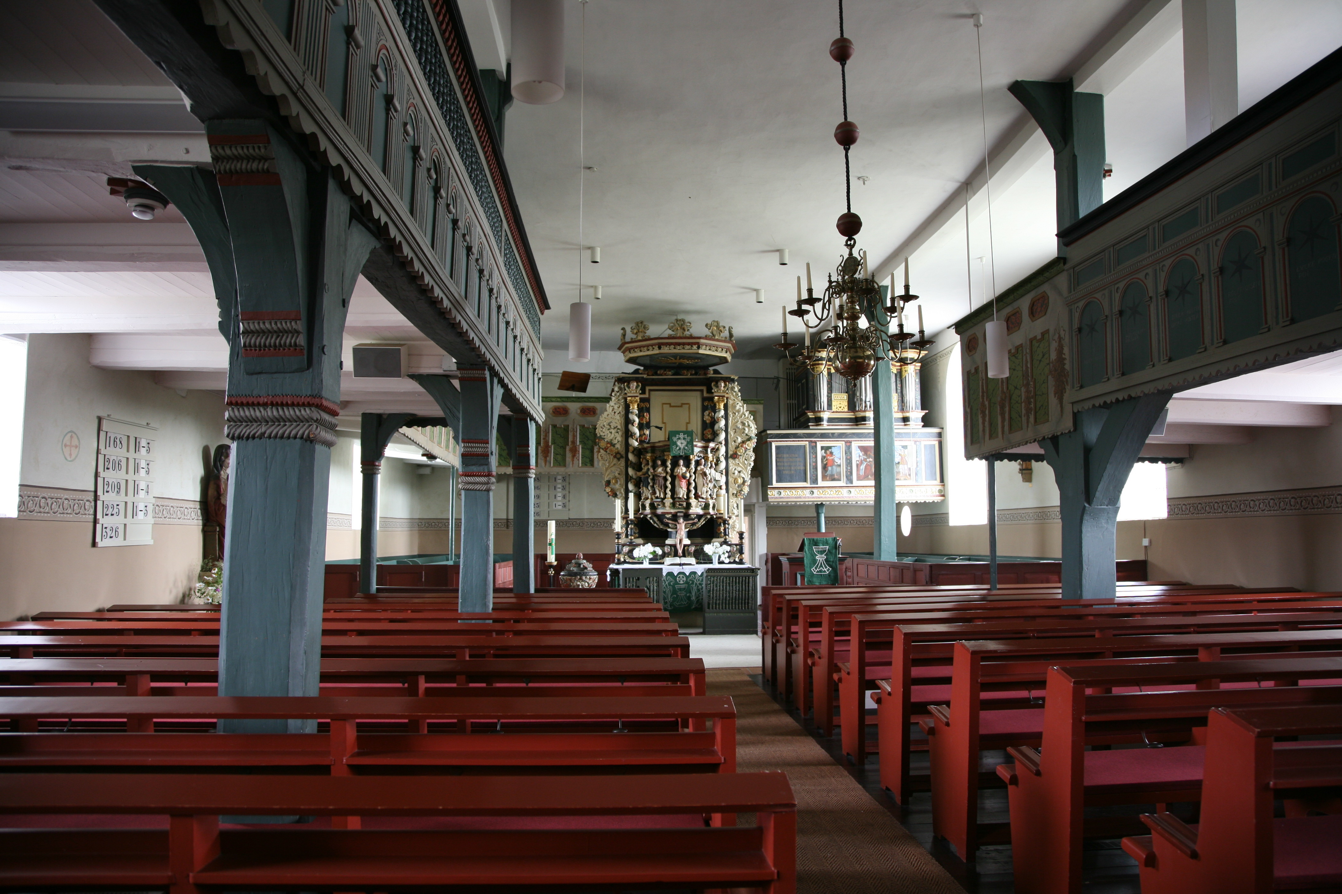 The church St. Marien in Burlage, Landkreis Diepholz